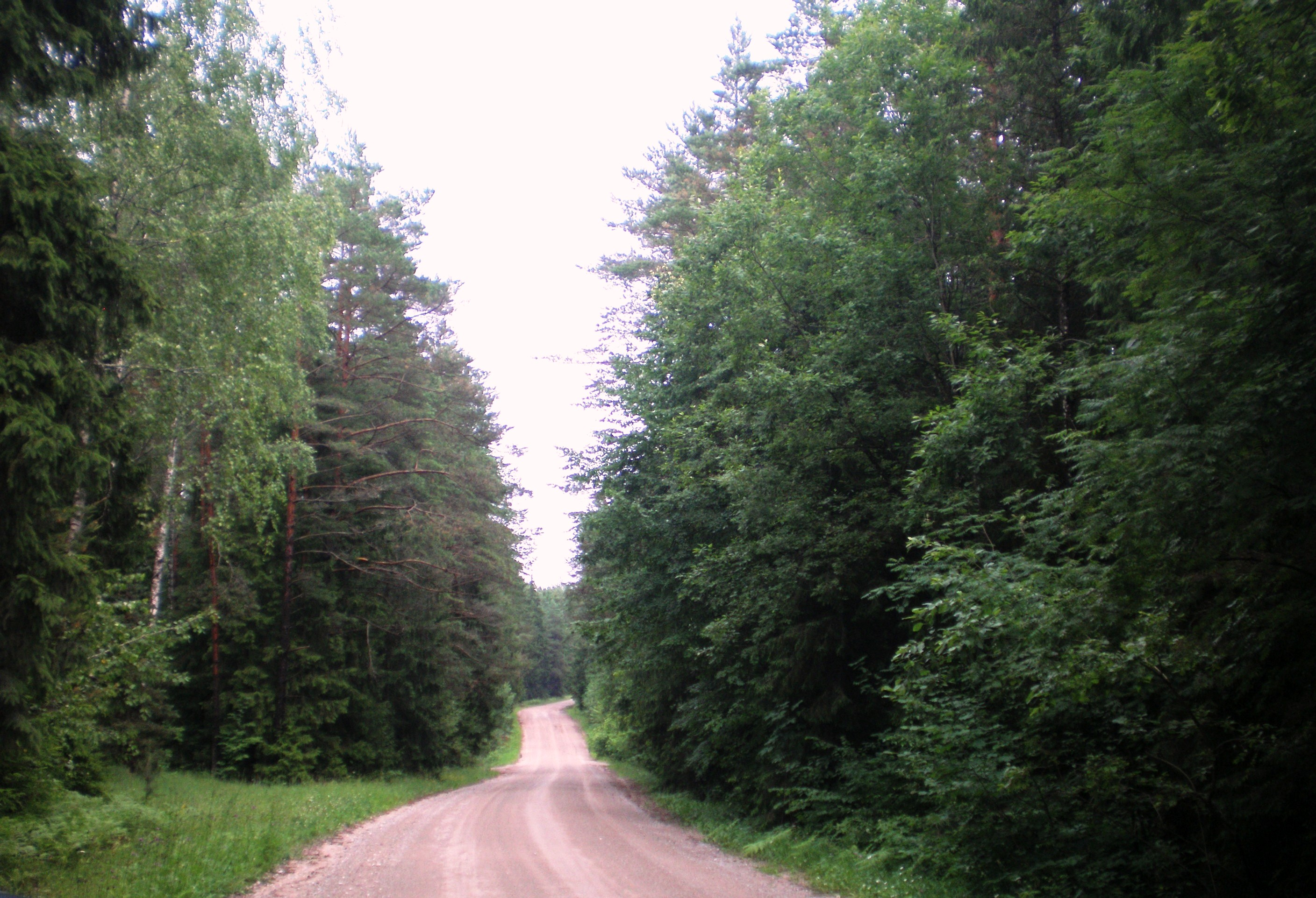 Palapišių miškas, Raseinių raj.